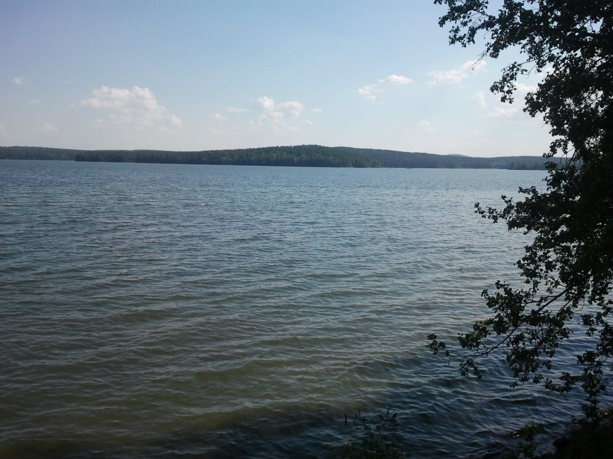 Малое Миассово озеро.